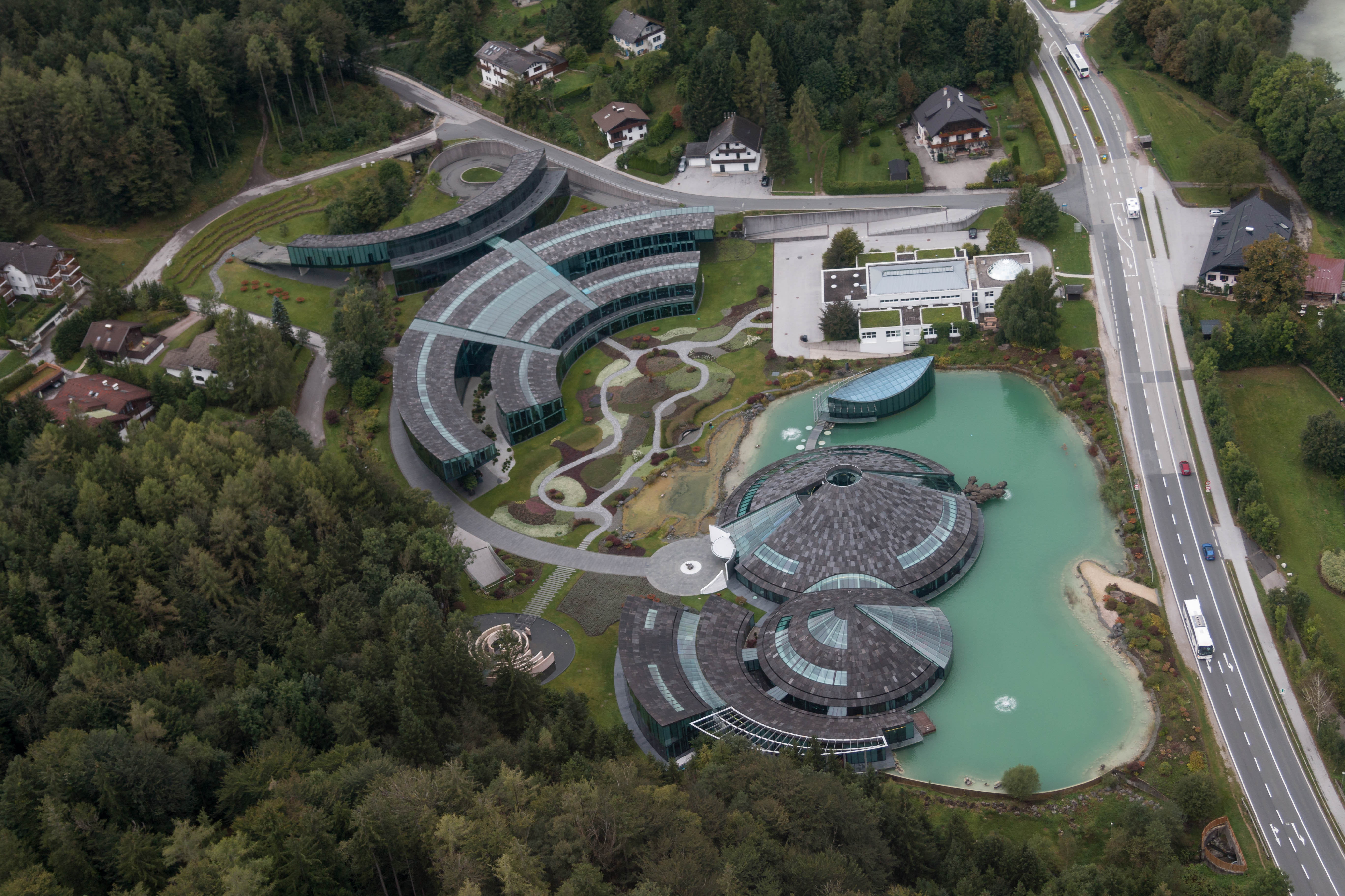 Red Bull Headquarters am Fuschlsee